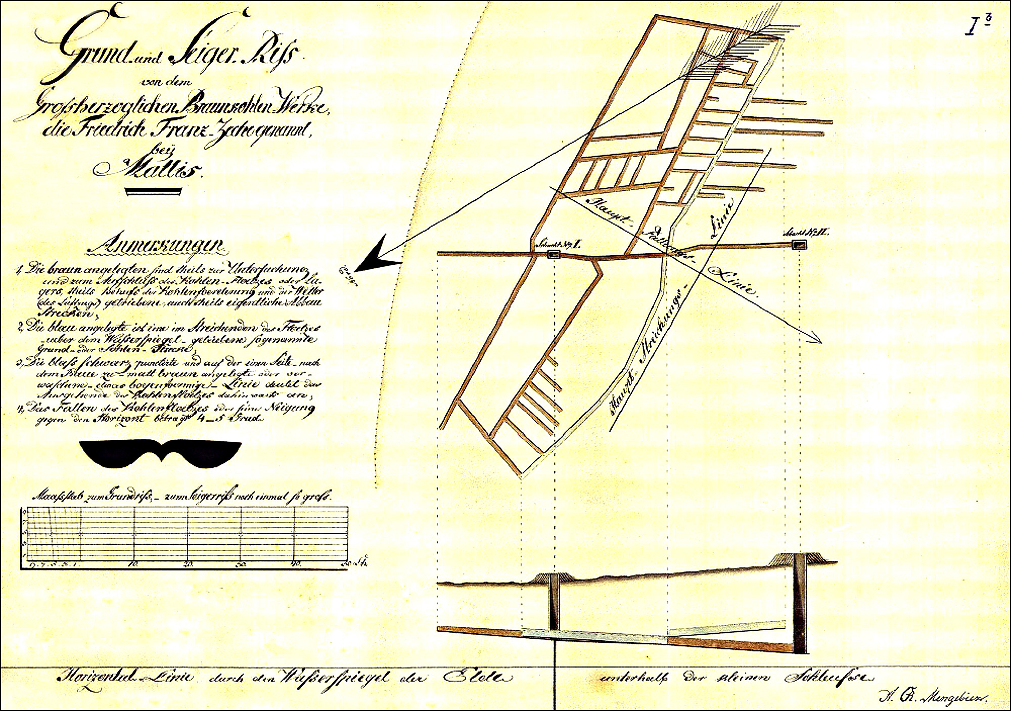 Grubenriß der Friedrich-Franz-Zeche bei Malliß (Landkreis Ludwigslust-Parchim).